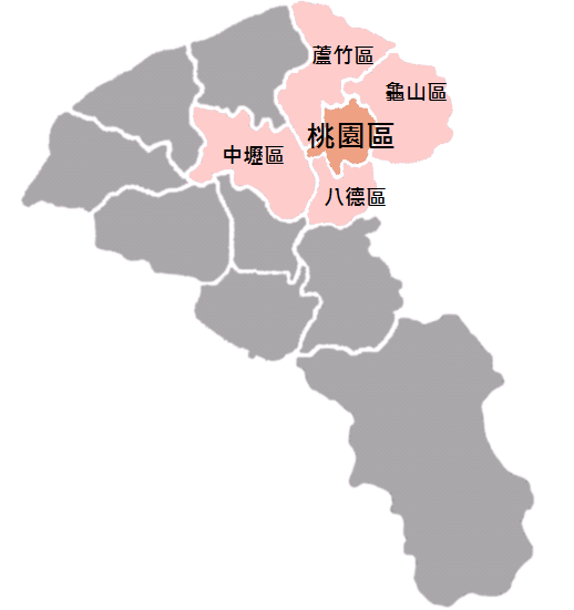 桃園區位置圖